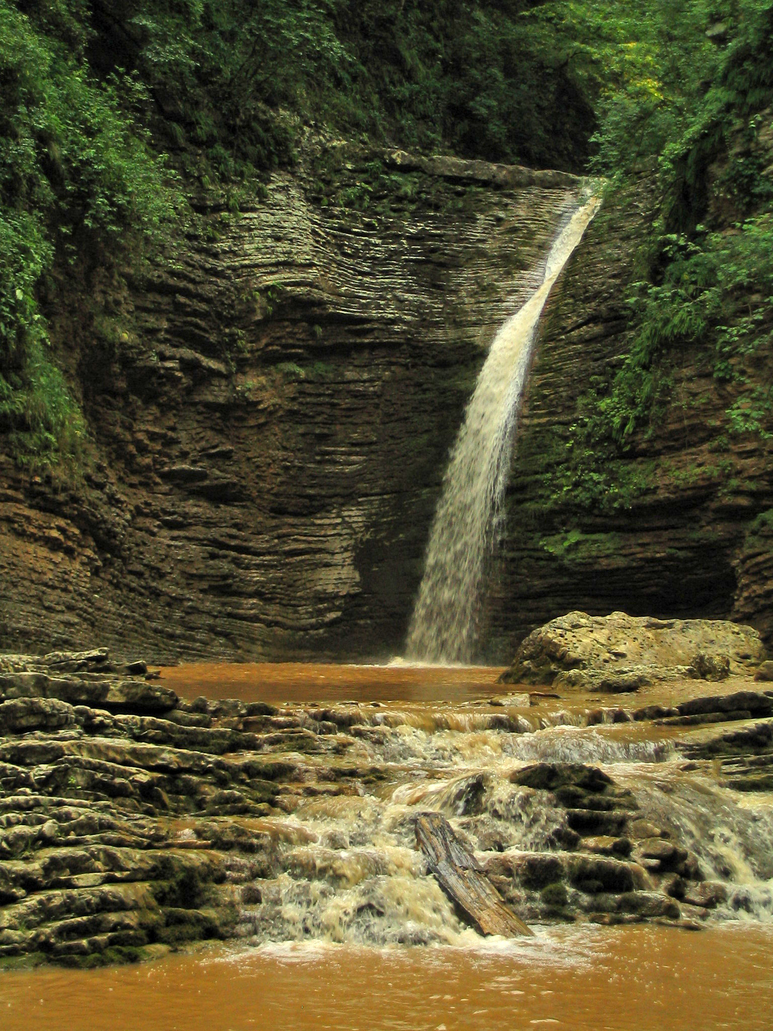 Rufabgo falls, Adygea, Russia RU: Водопад "Девичья коса" на реке Руфабго, Адыгея